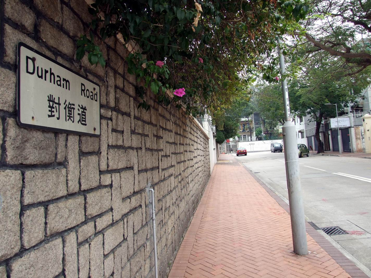 中文（香港）: 對衡道